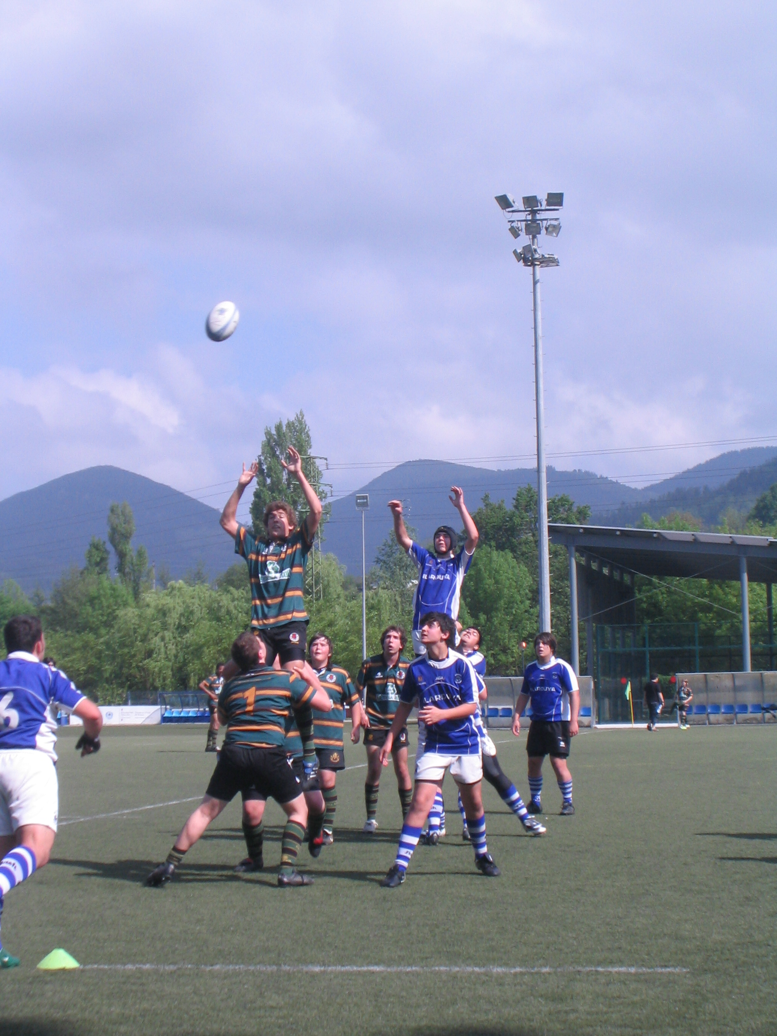 Un momento de juego de un equipo del Durango Rugby Taldea contra otro del Gernika Rugby Taldea. (cadetes)